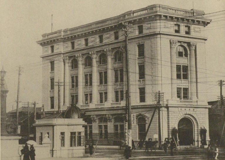 村井銀行 明治大正建築写真聚覧